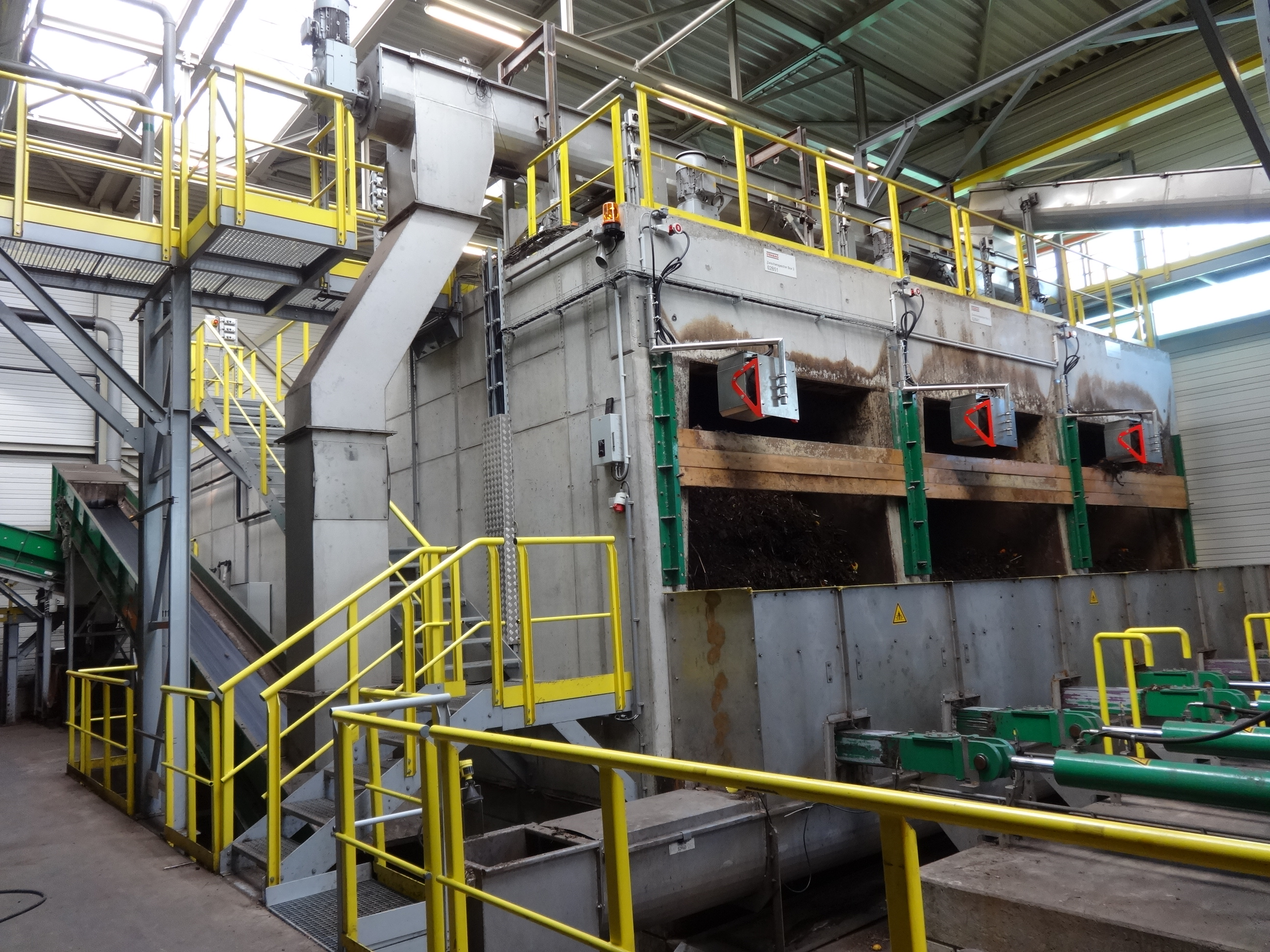 Die Biogasanlage Berlin erzeugt seit 2013 aus rund 60.000 Bioabfall vorzugsweise aus Berliner Privathaushalten Biomethan, in dem Biomasse vergärt wird. Sie befindet sich in der Berliner Ortslage Ruhleben im Ortsteil Westend.